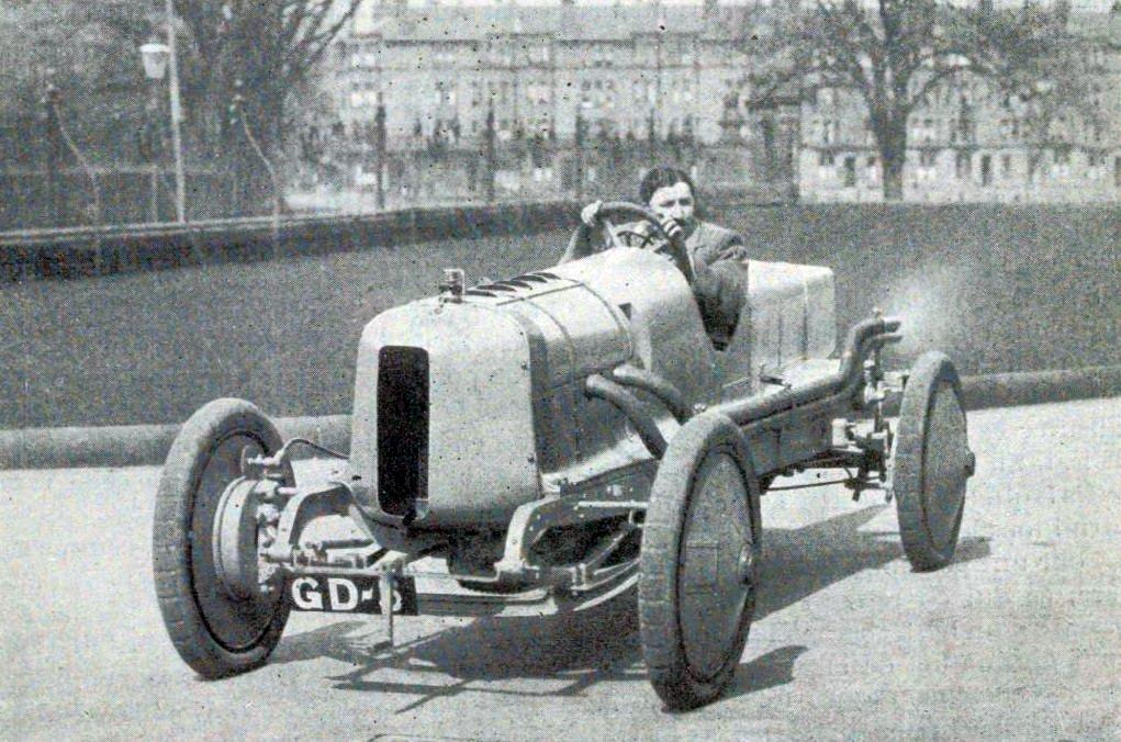 L'ingénieur automobile français Henri Perrot, sur voiture anglaise Argyll (mai 1913, records mondiaux d'endurance des 7, 8, 9, 10, 11, 12, 13, et 14 heures, et sur 600, 700, 800, 900 et 1 000 miles).